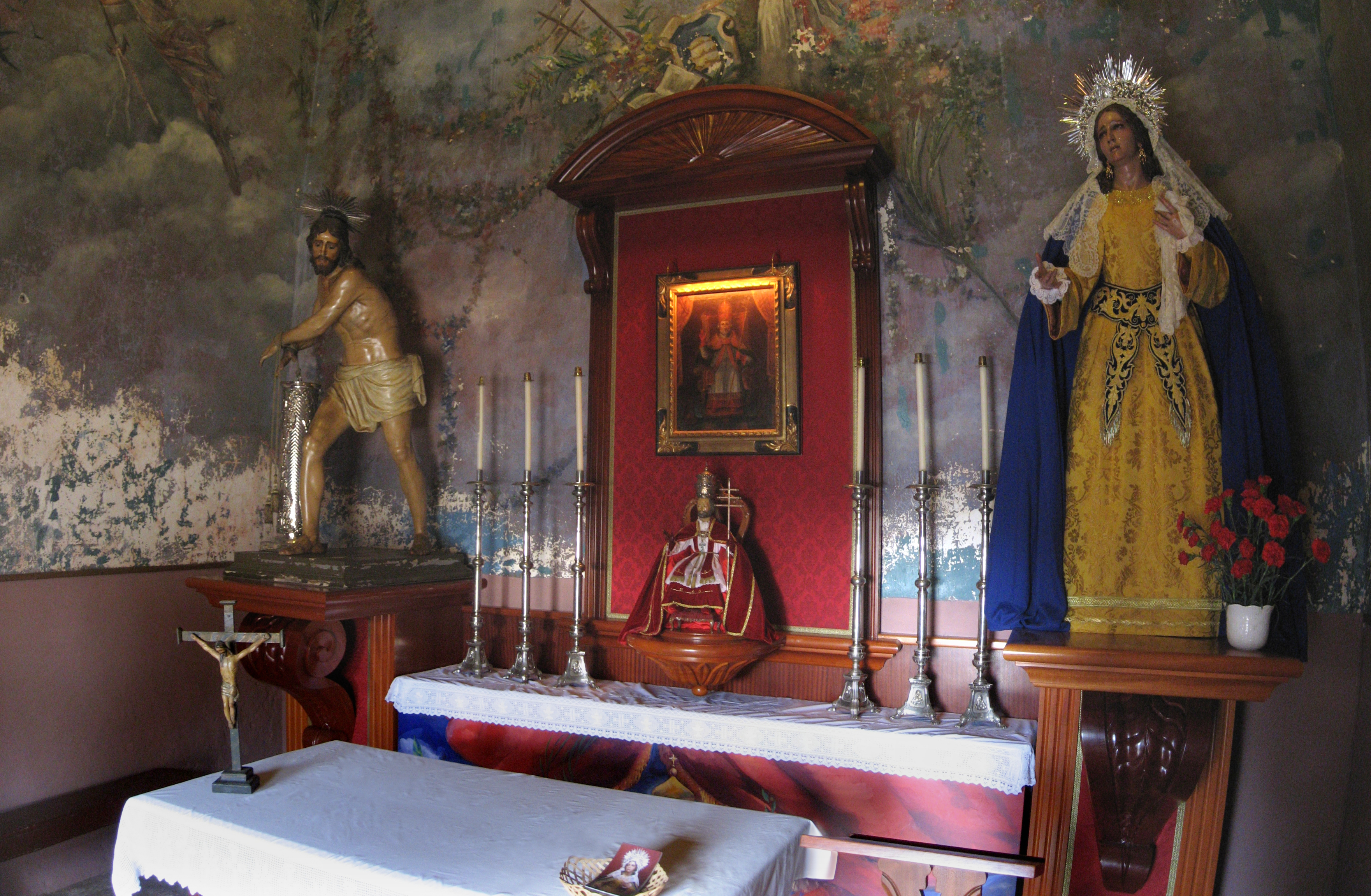 Interior de la Capilla de San Pedro de Arriba, Güímar, Canarias